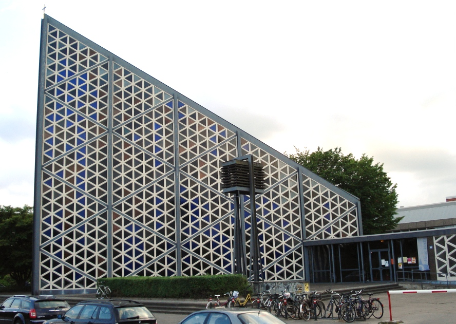 Universitaetskirche Kiel